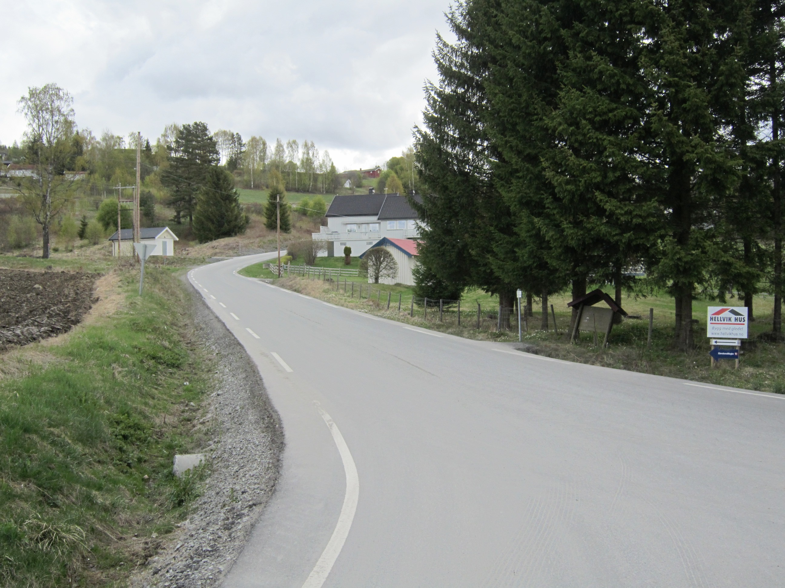 Kløvstadhøgdvegen (FV1660, tidl. 4) i Brøttum